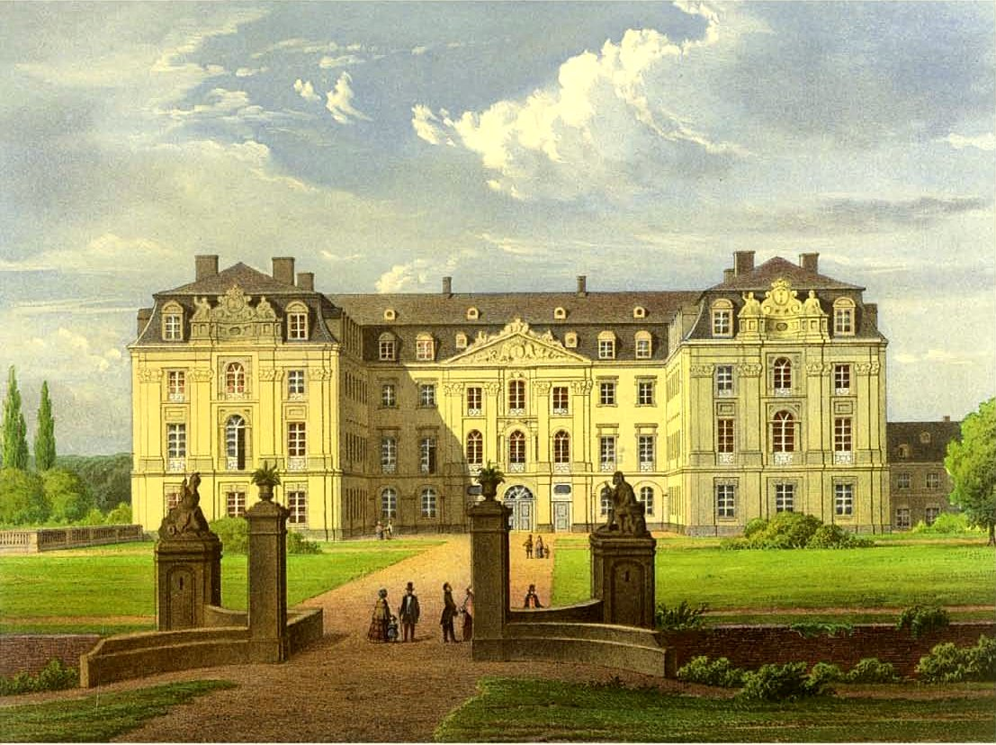 Schloss Augustusburg, Landkreis Köln, Rhein-Provinz